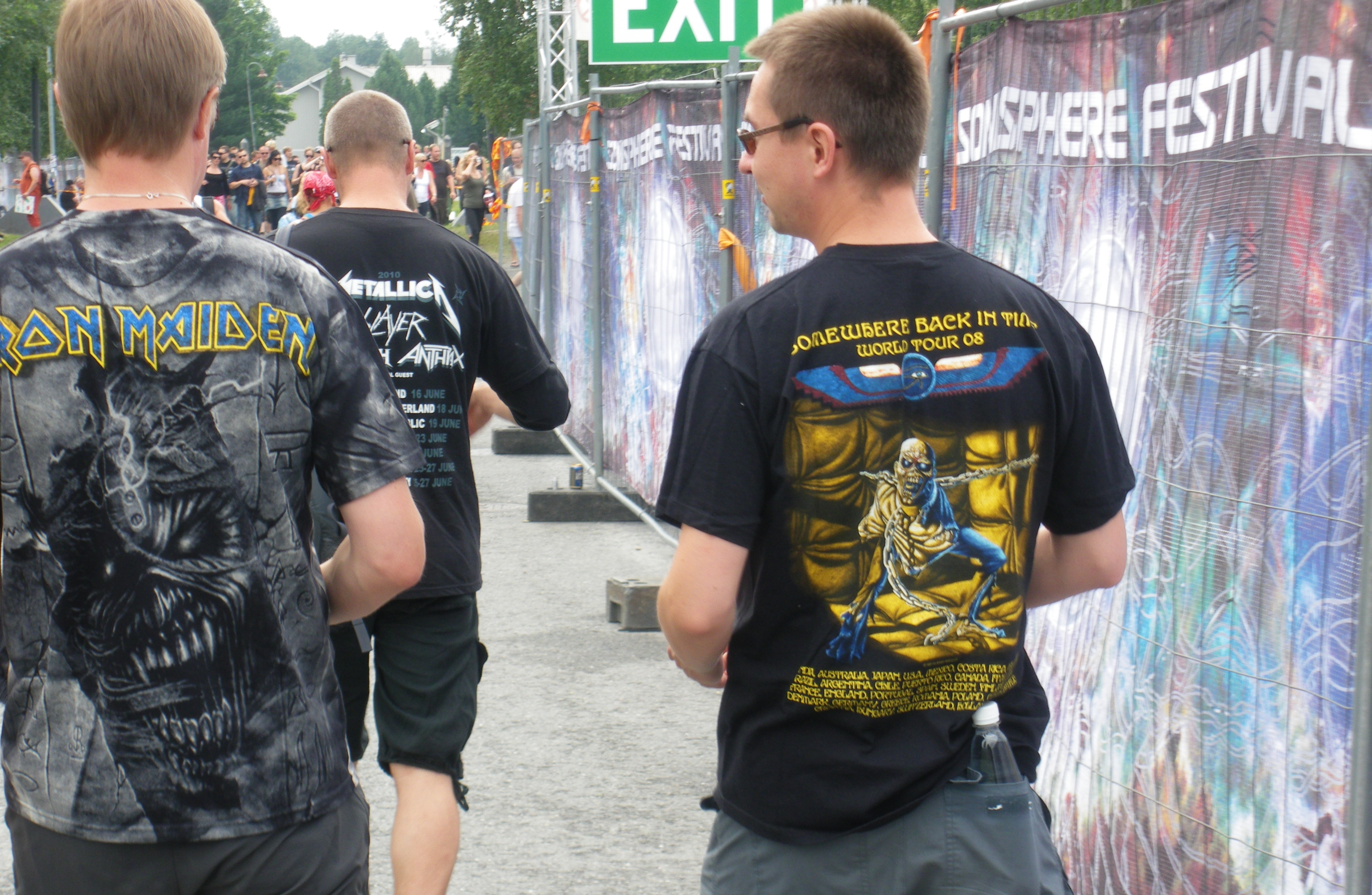 Sonisphere Pori, 8. august 2010